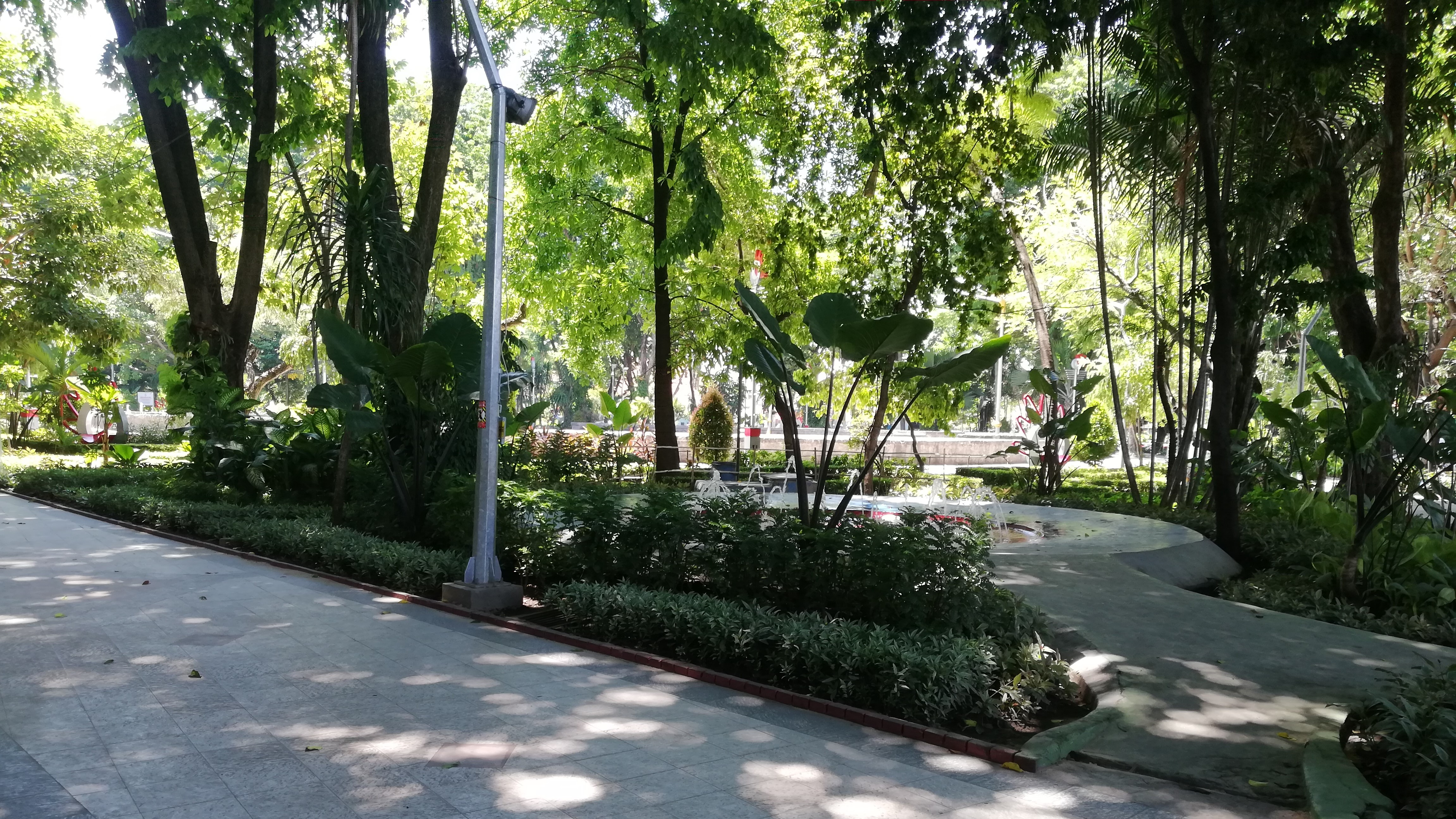 Bungkul Park at noon